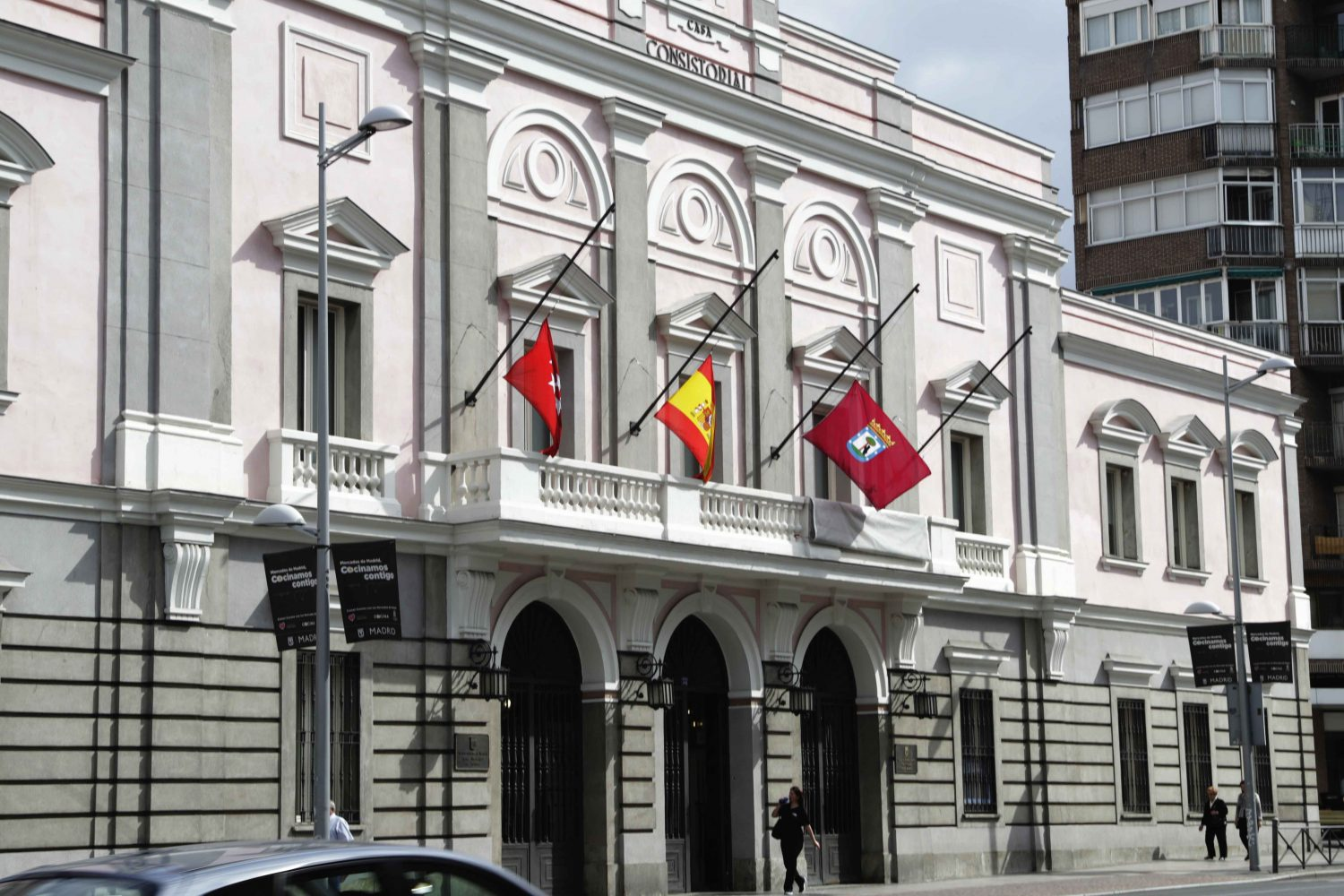 La alcaldesa de Madrid, Manuela Carmena, y la delegada de Políticas de Género y Diversidad, Celia Mayer, junto a otros miembros de la corporación y trabajadores y trabajadoras municipales, ha guardado a mediodía de hoy, lunes 29 de mayo, un minuto de silencio ante el Palacio de Cibeles para lamentar y condenar los últimos asesinatos machistas, ocurridos este fin de semana, en Ciudad Lineal y Collado Villalba.